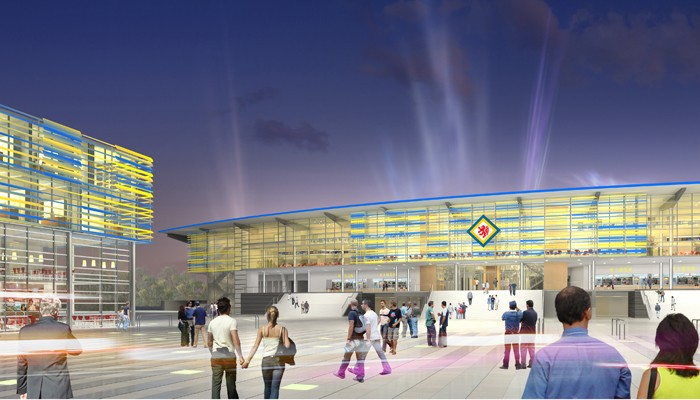 geplanter Stadionausbau des Eintrachtstadions in Braunschweig